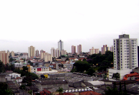 Vista parcial do centro de Diadema.